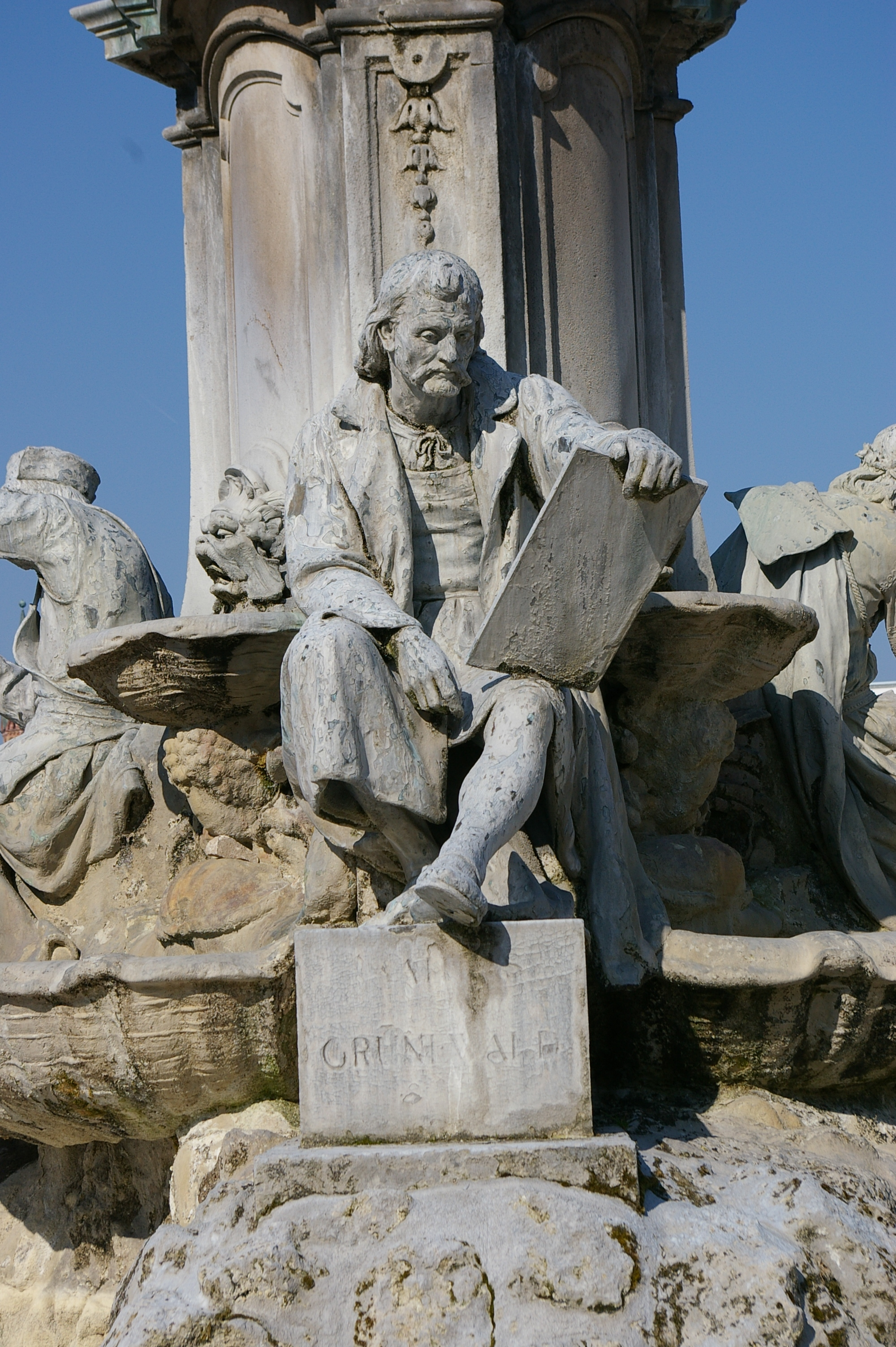 Frankoniabrunnen Würzburg, Matthias Grünewald